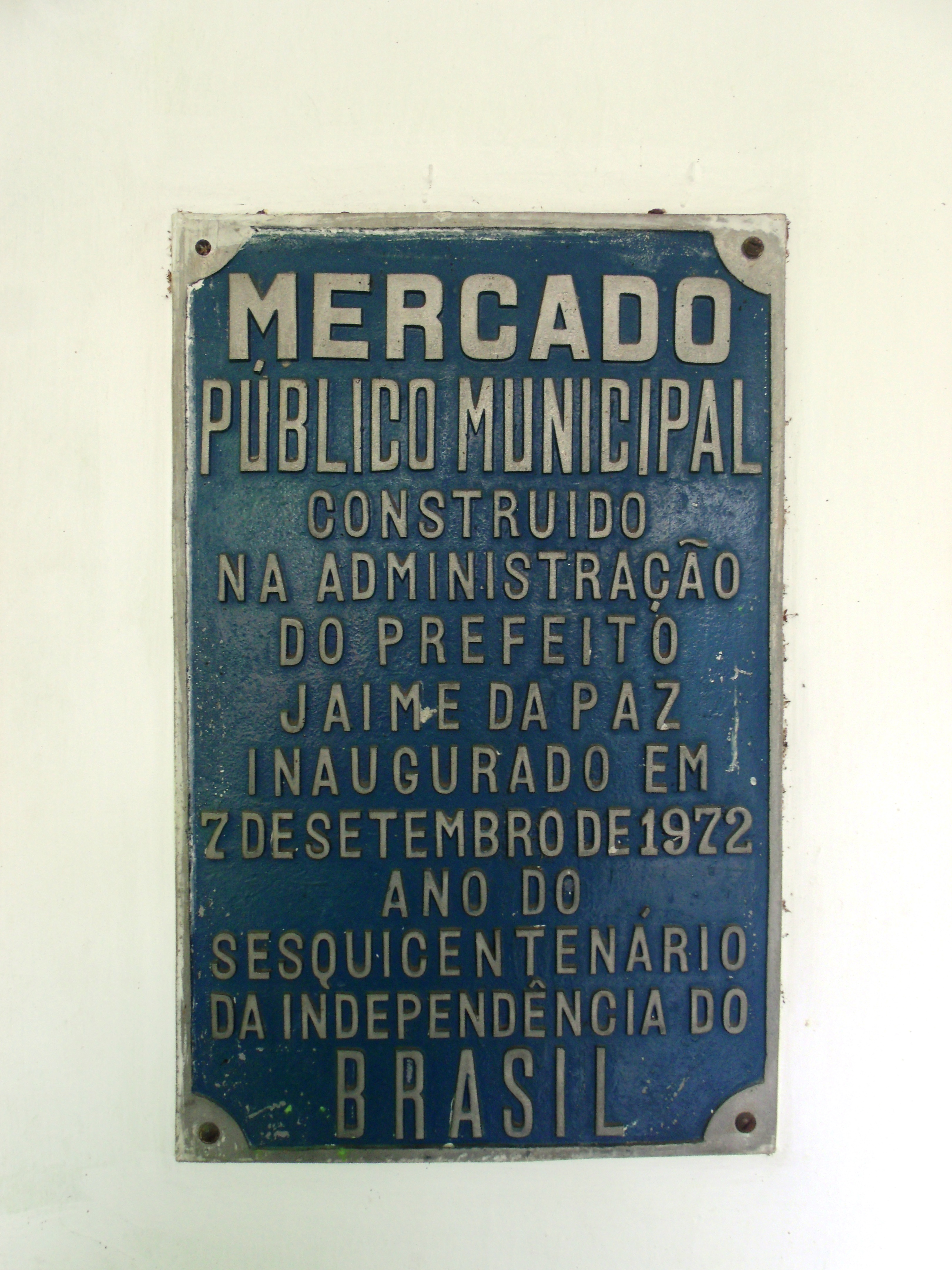 Peça etálica com a placa de inauguração do mercado público de Campo Maior, no Piauí.